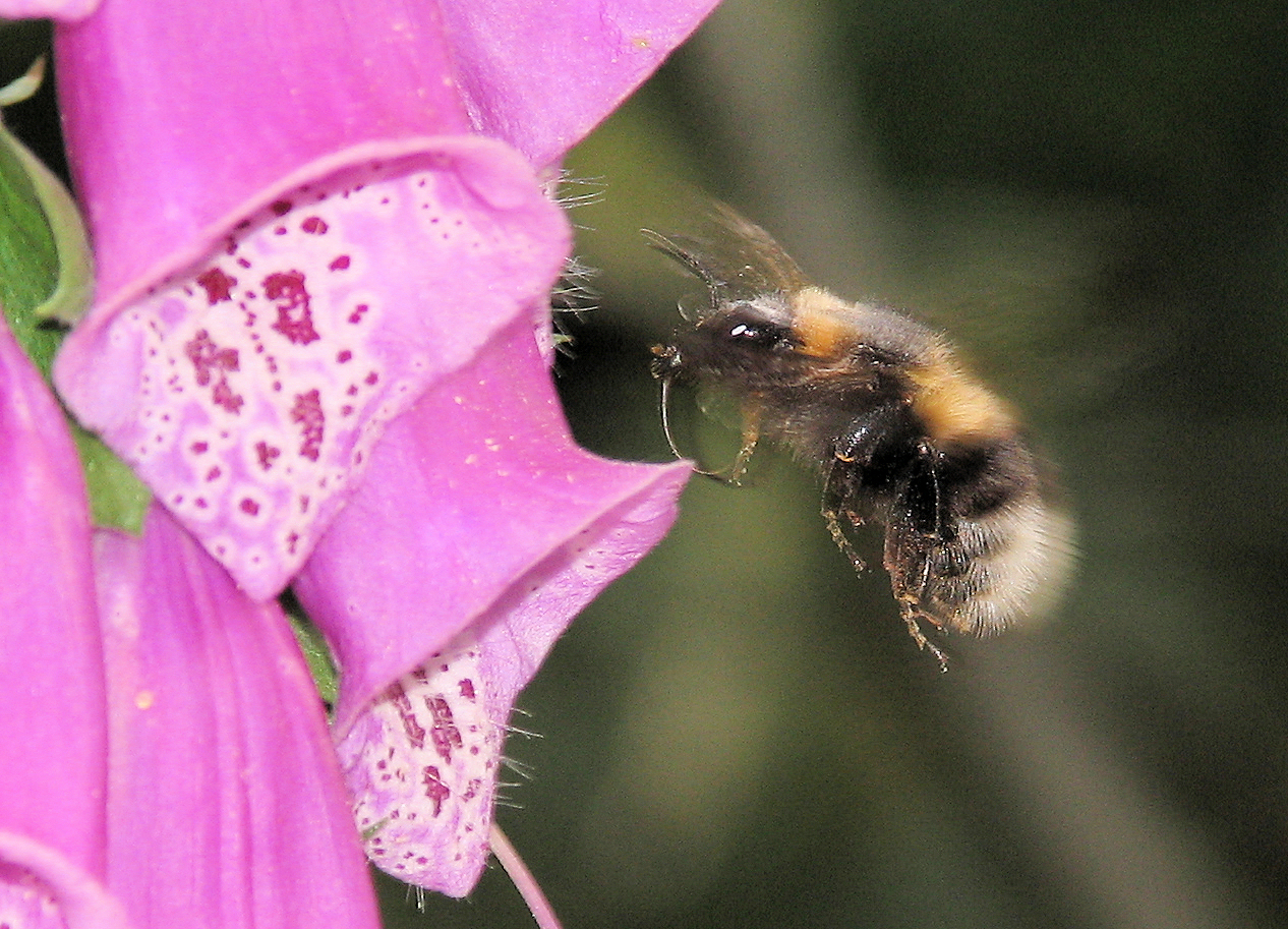 Erdhummel